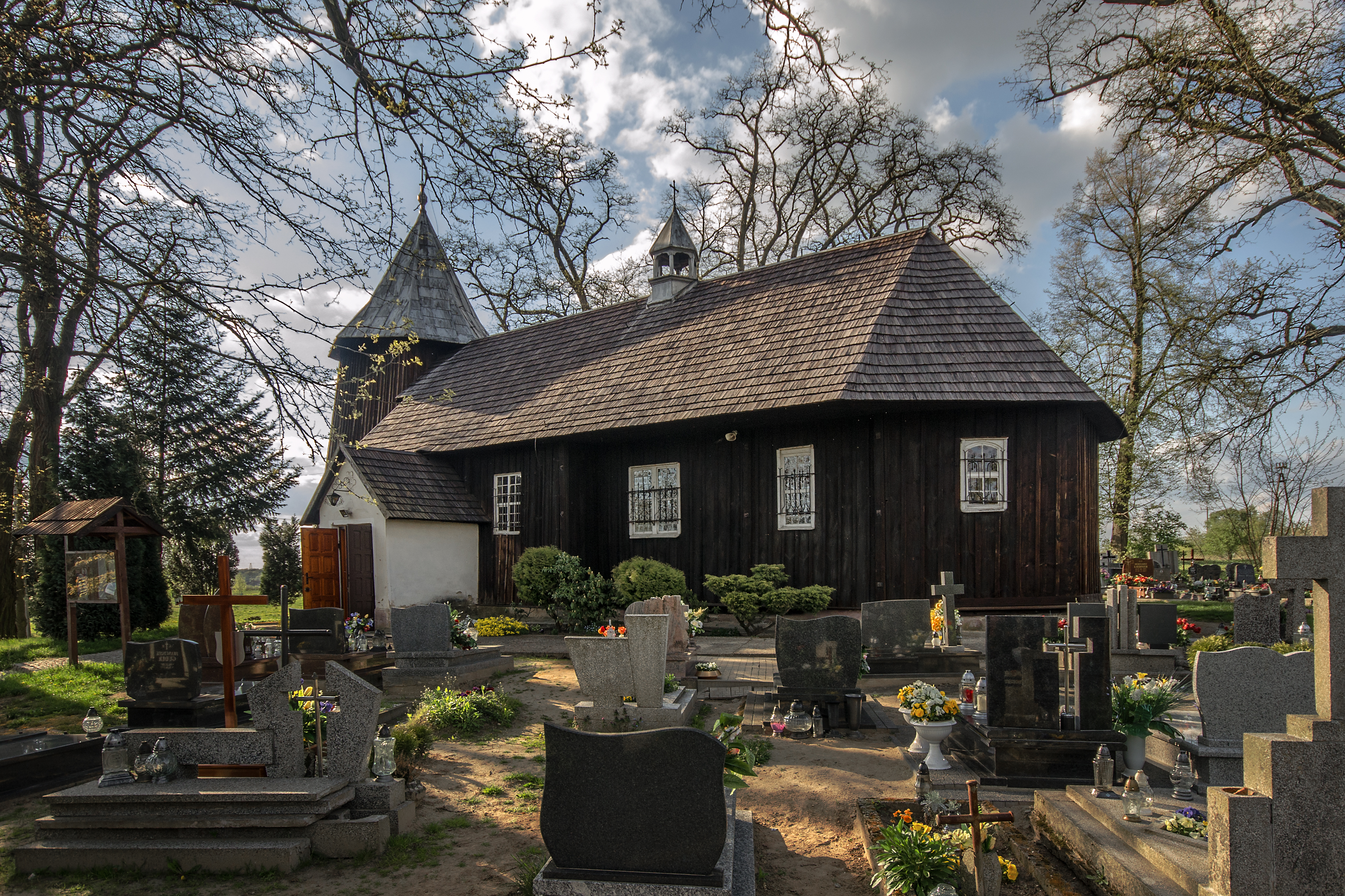 Koza Wielka, kościół fil. p.w. śś. Filipa i Jakuba, XVII/XVIII